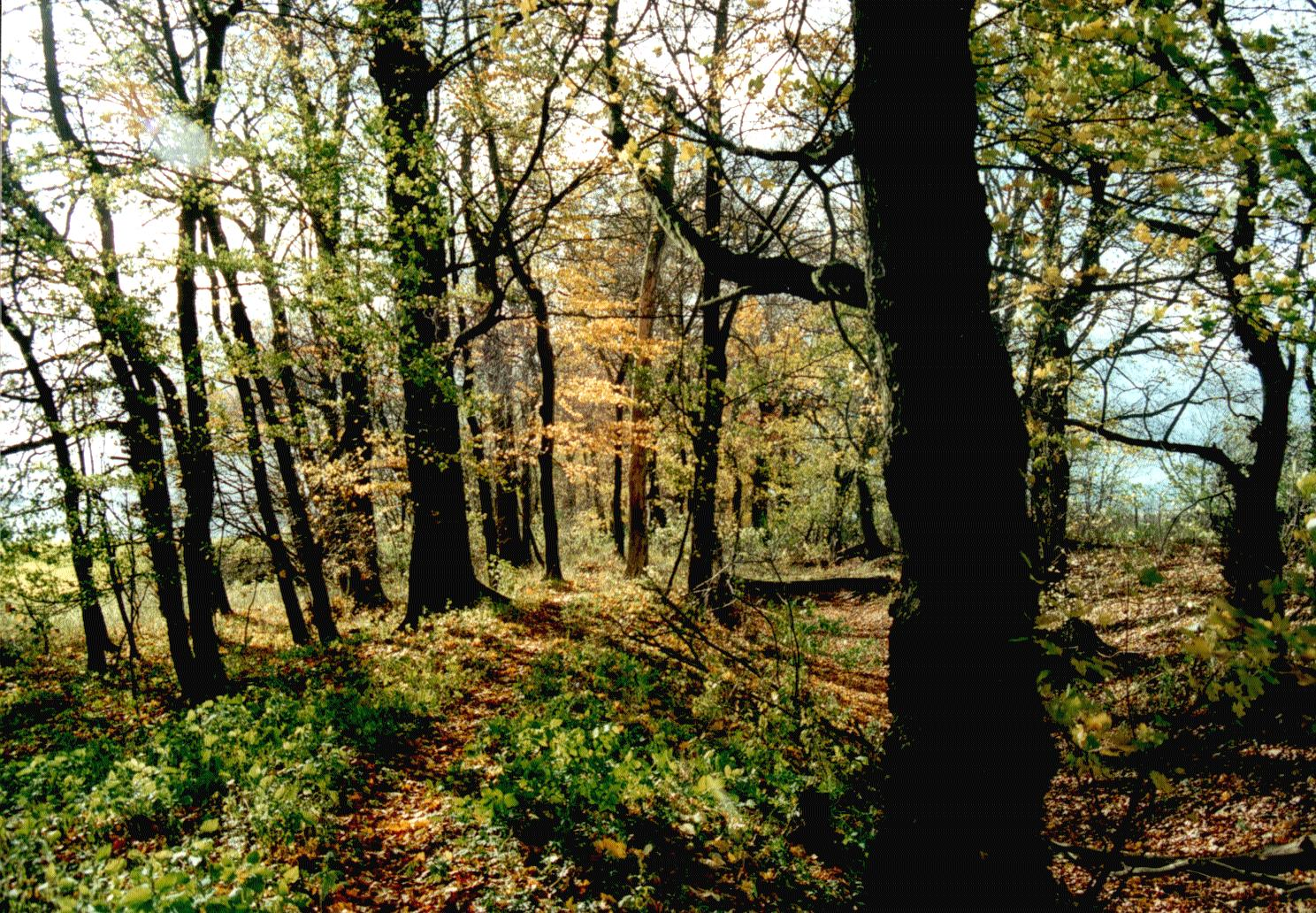 Mühlhäuser Landgraben im Herbst. Eigenes Foto vom Oktober 2000.